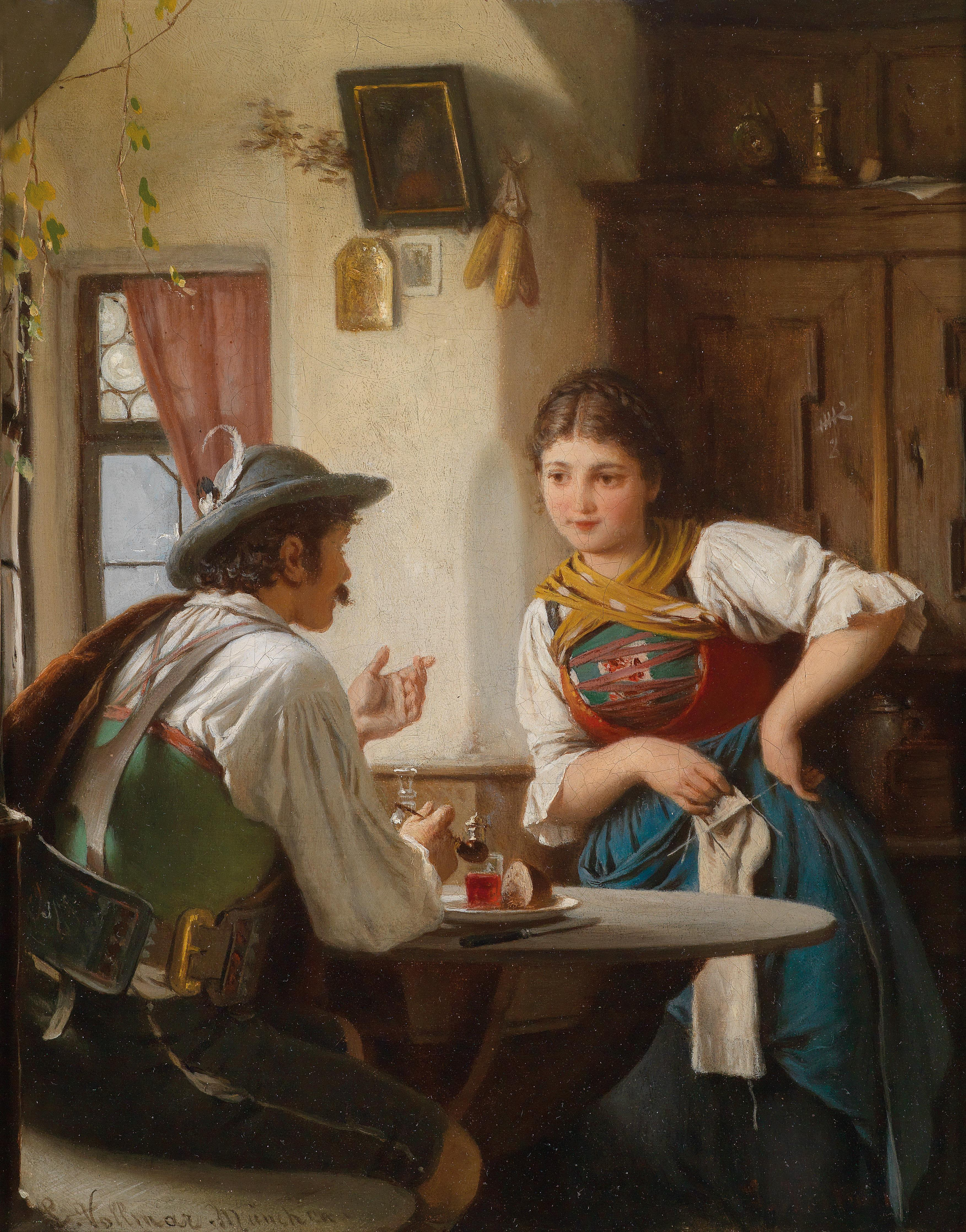 Der Verehrer, signiert, bezeichnet L. Vollmar. München, Öl auf Leinwand, 29 x 24 cm